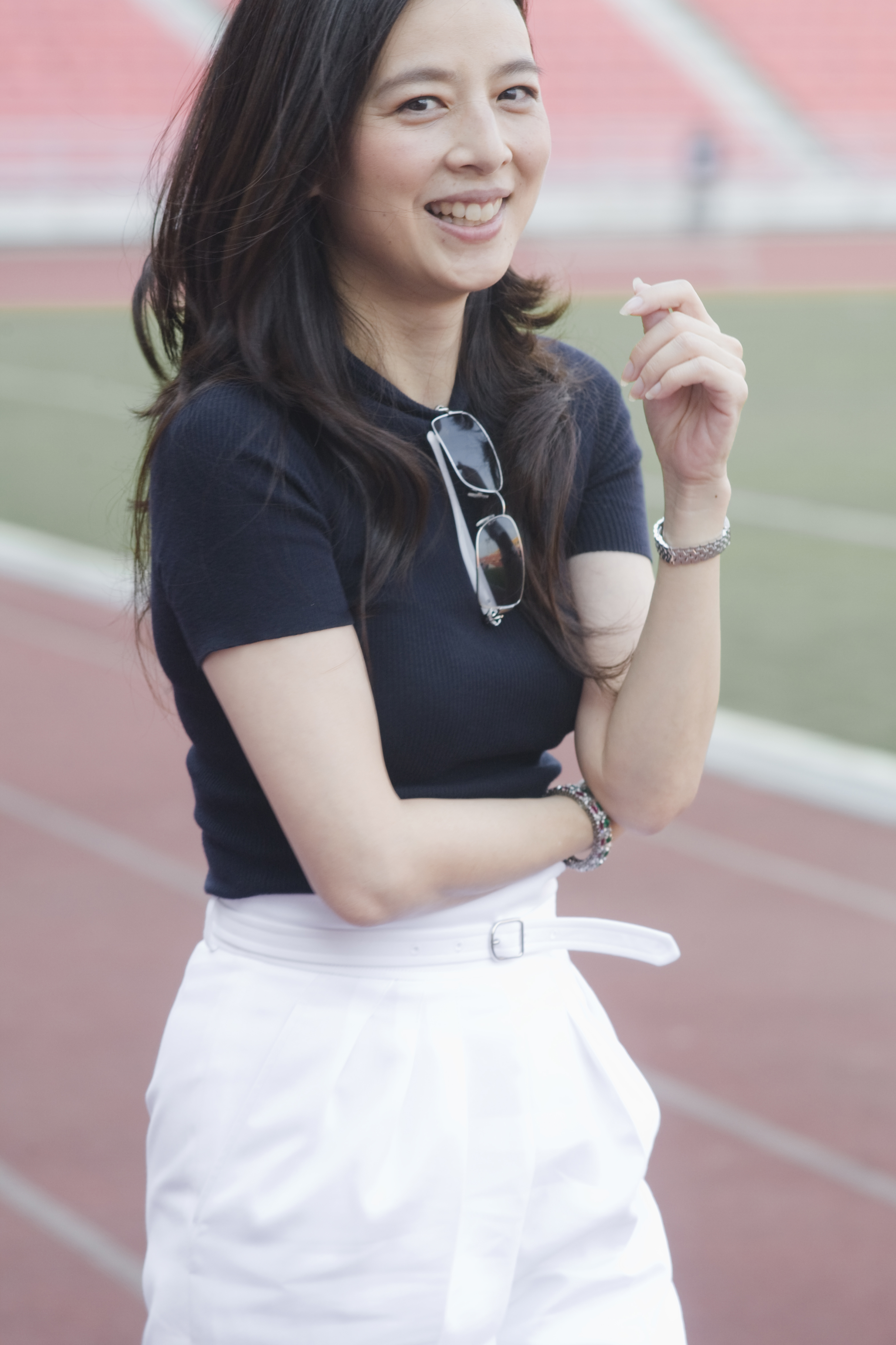 นวลพรรณ ล่ำซำ / นายกรัฐมนตรี นำทีมนักกีฬาฟุตบอลชายกิตติมศักดิ์เข้าร่วมการแข่งขันฟุตบอลนัดพิเศษกับทีม ฟุตบอลหญิงทีมชาติไทยชุดใหญ่ ณ สนามราชมังคลากีฬาสถาน กรุงเทพฯ 21 กุมภาพันธ์ 2553 (The Official Site of The Prime Minister of Thailand Photo by พีรพัฒน์ วิมลรังครัตน์)